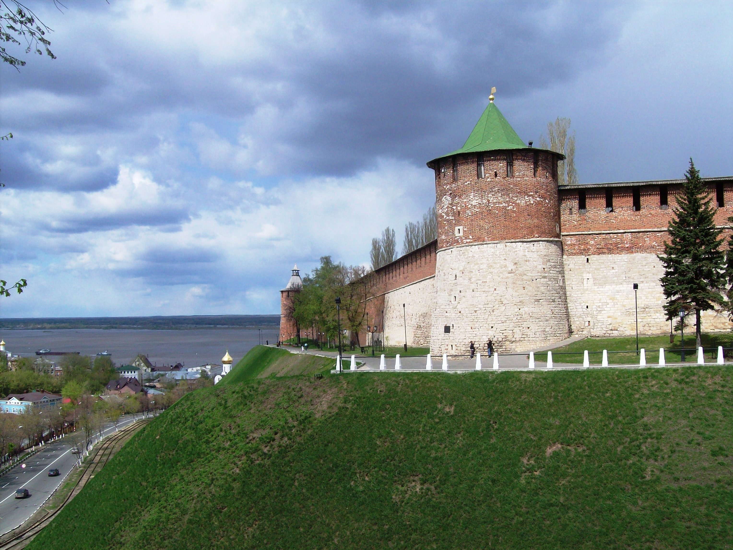 Нижегородский кремль, Коромыслова башня